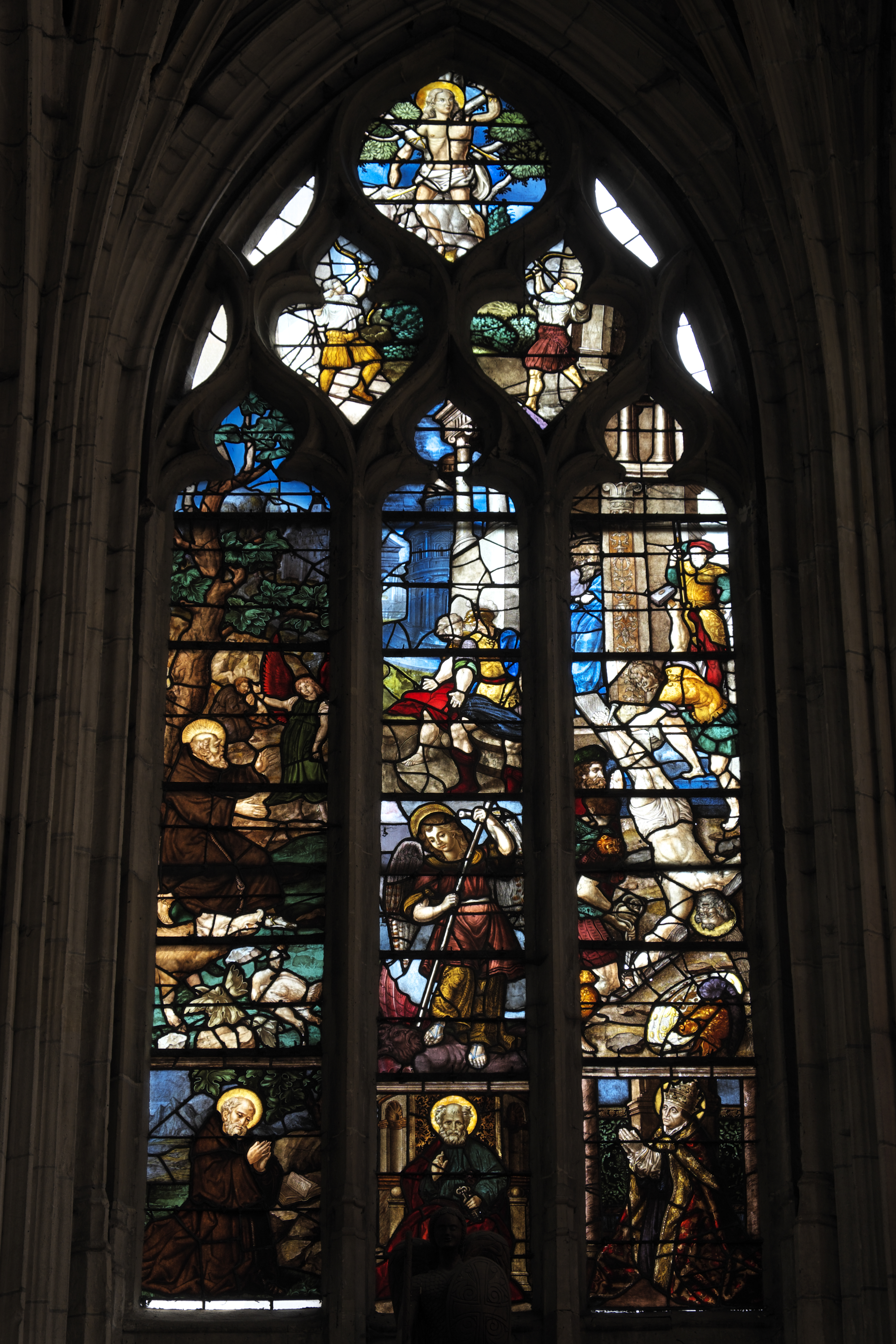 Katholische Kirche Sainte-Foy in Conches-en-Ouche im Département Eure (Haute-Normandie/Frankreich), Bleiglasfenster aus der 1. Hälfte des 16. Jahrhunderts; Darstellung: Erzengel Michael (Mitte), im Maßwerk: hl. Sebastian